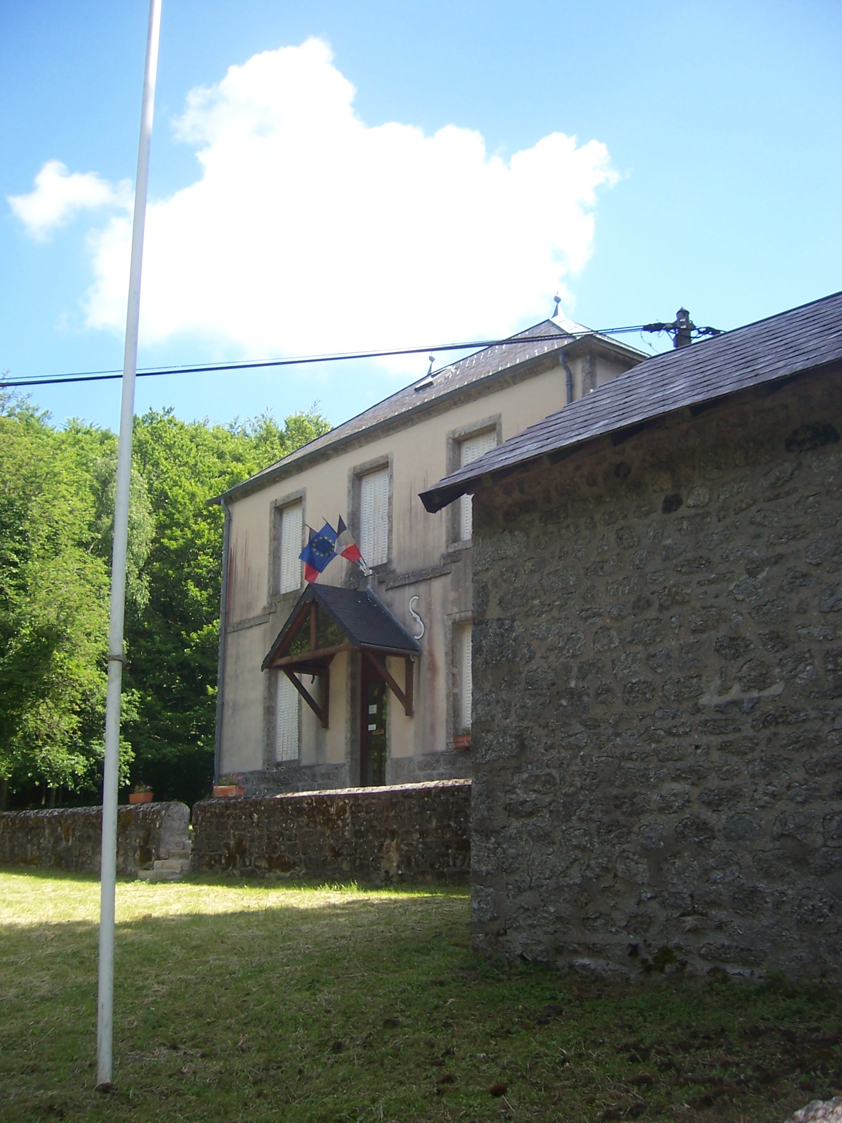 Mairie d'Uchon